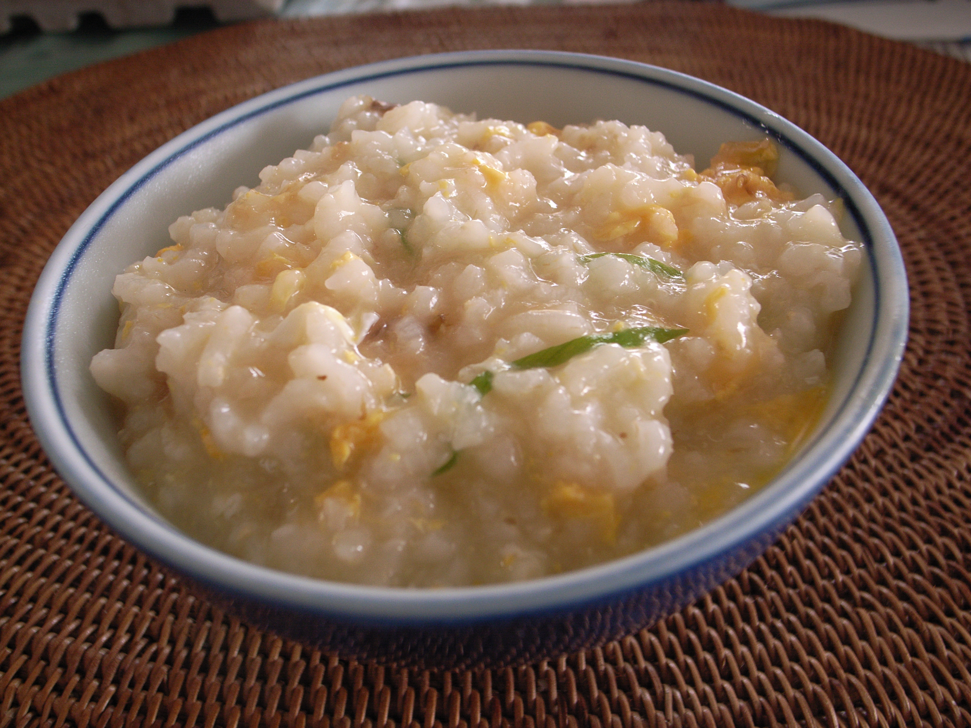 Rice gruel